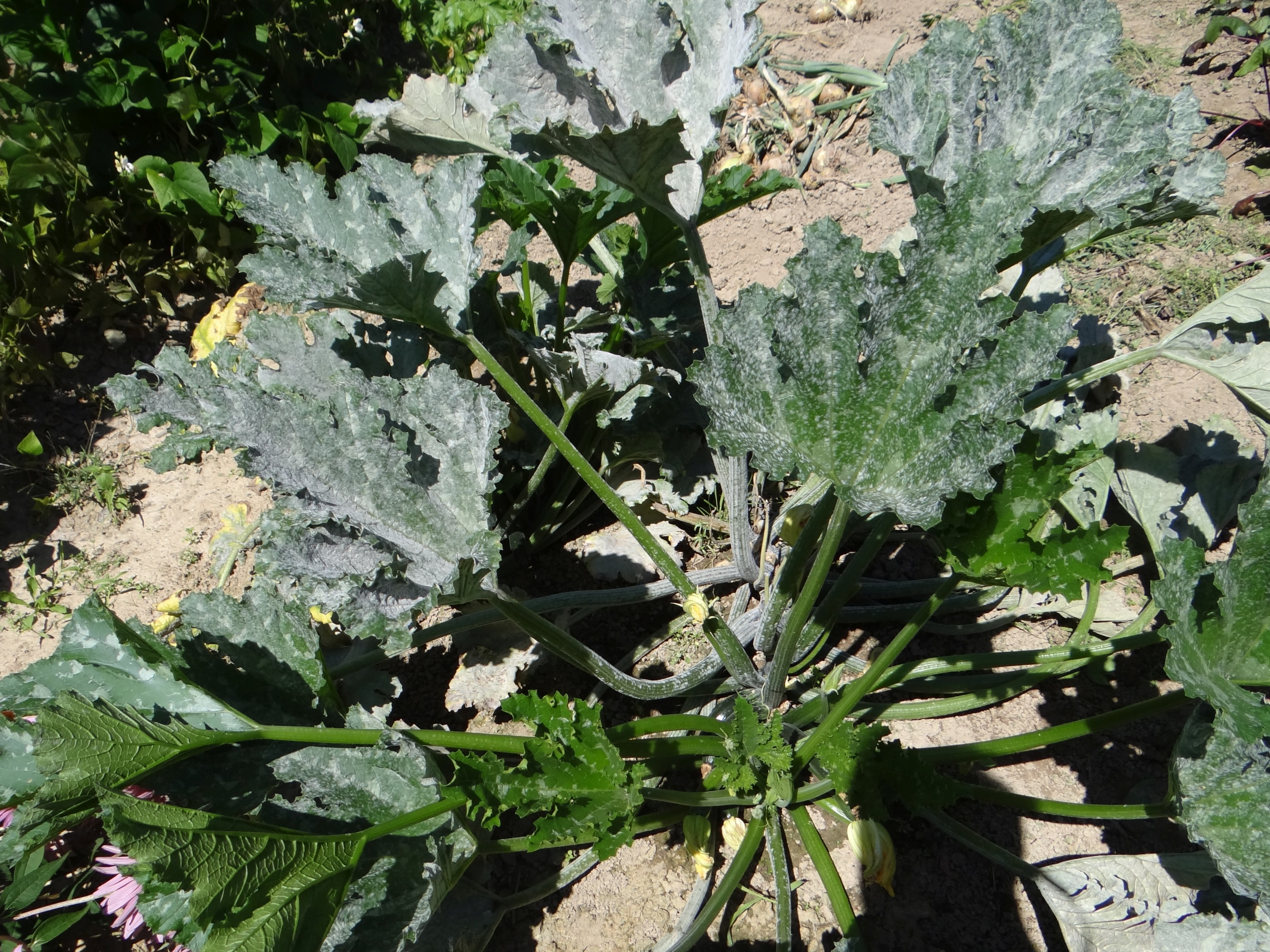 Podosphaera fusca on Cucurbita pepo var giromontiina